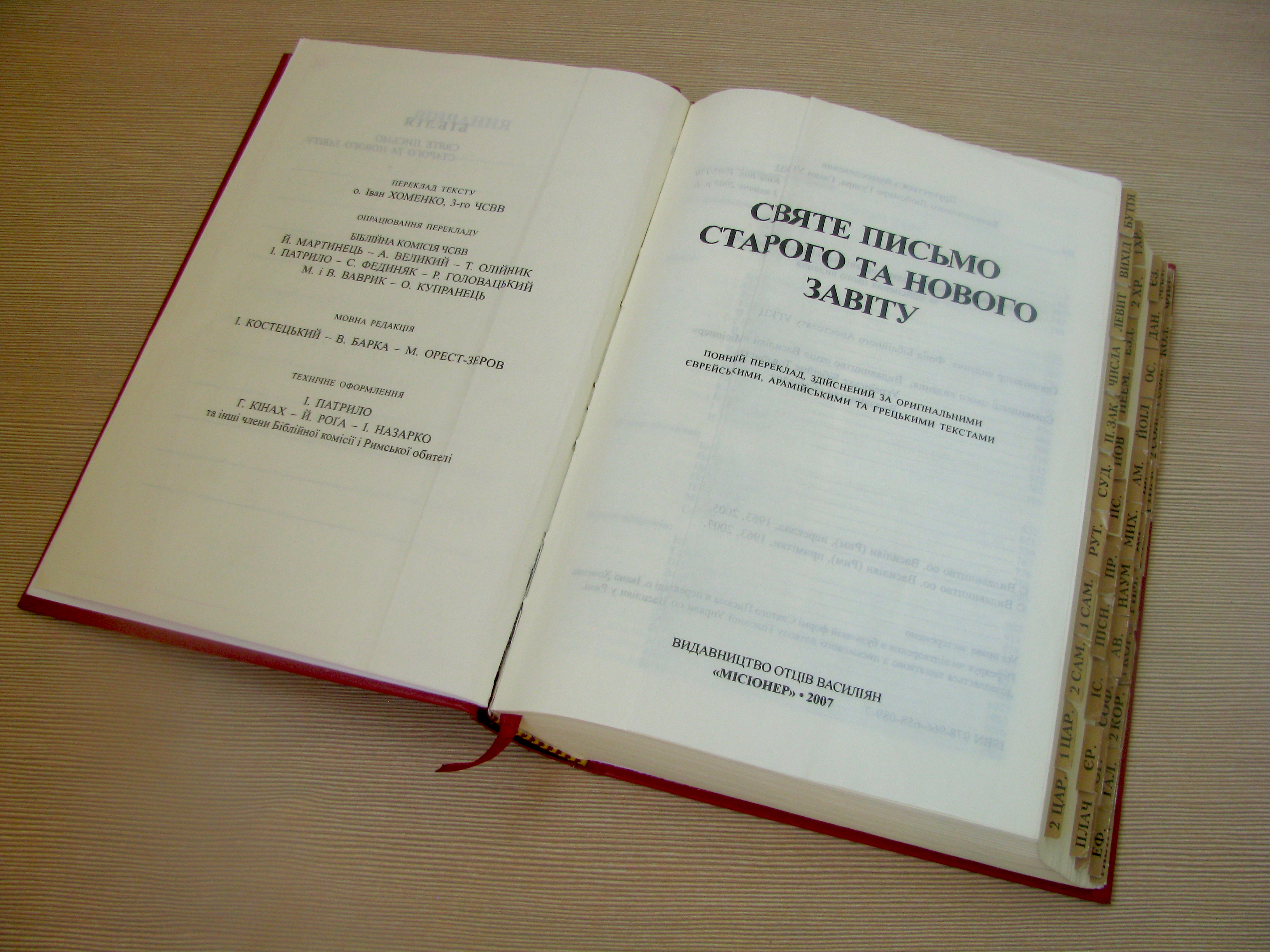 Святе письмо. Переклад о. Іван Хоменко.